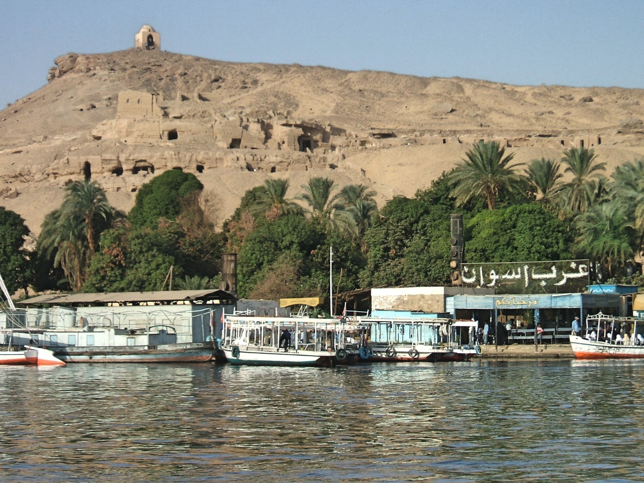 Rive occidentale du Nil à Assouan, Egypte This is an image with the theme "Africa on the Move or Transport" from: Egypt